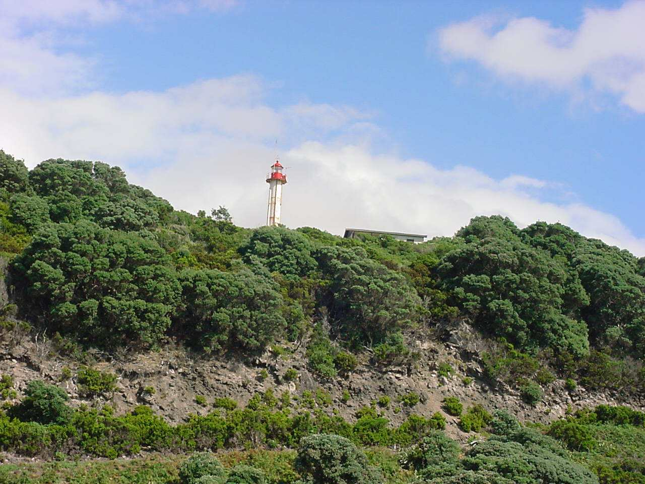 Farol da serreta, ilha Terceira, Açores, Portugal.